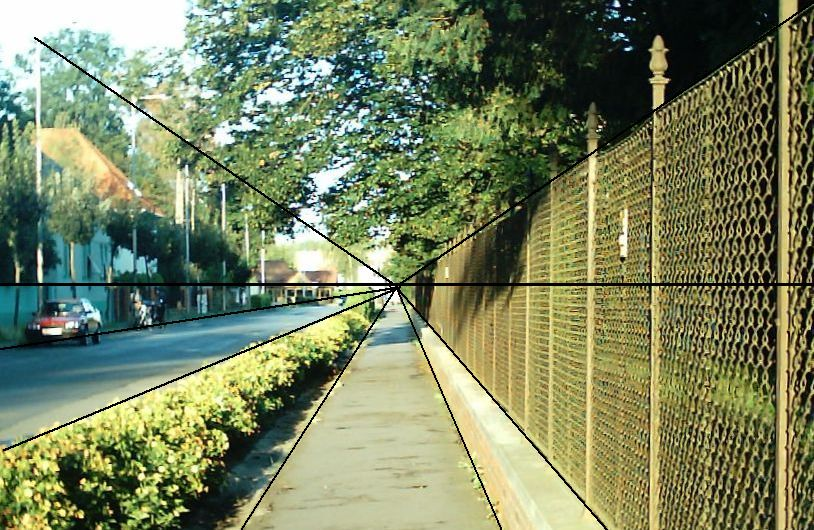 Perspektíva elemei (helyszín: Szentgotthárd)